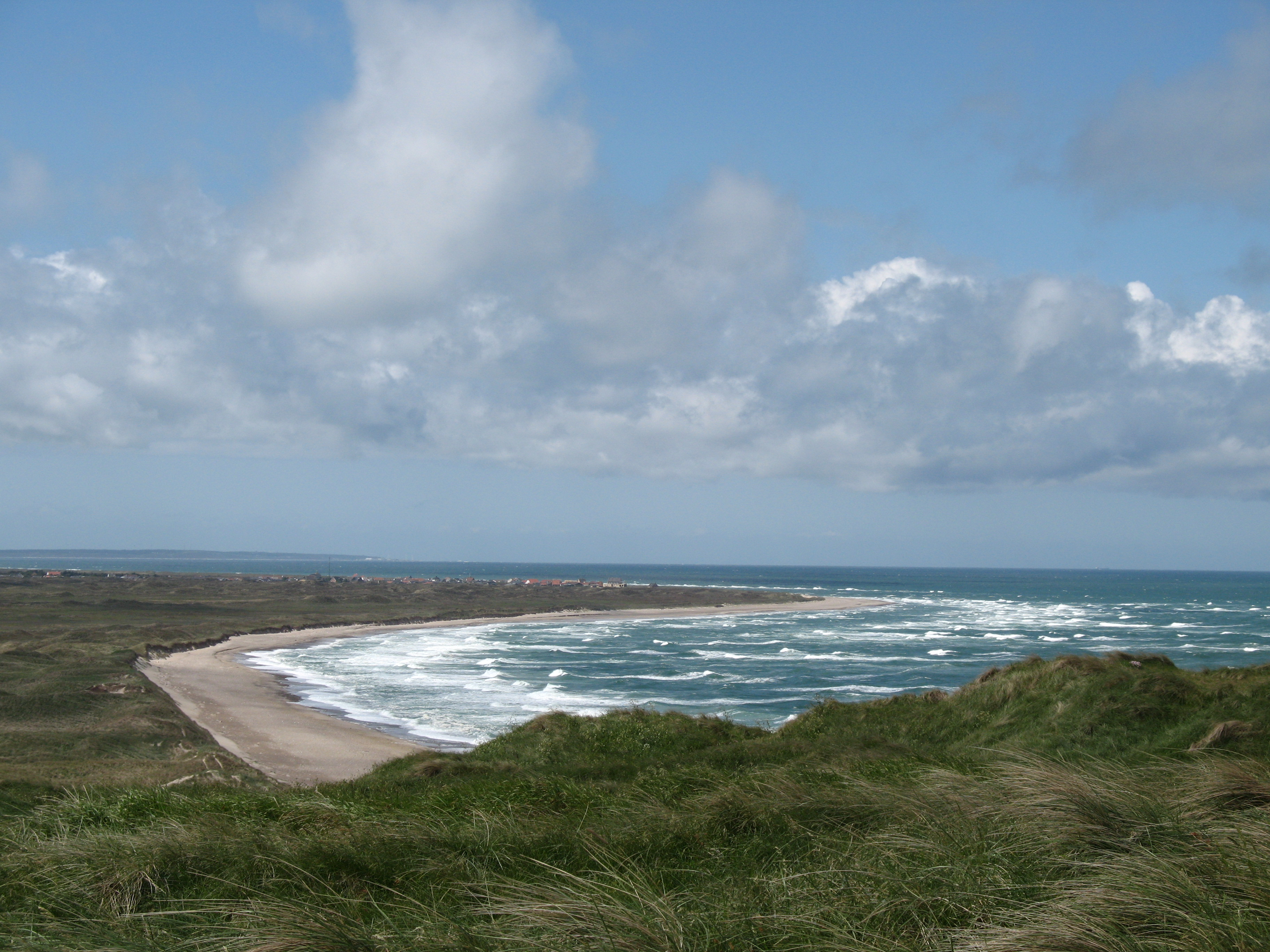 Aussicht vom Bulbjerg über die Vigsø bugt, Jütland, Dänemark